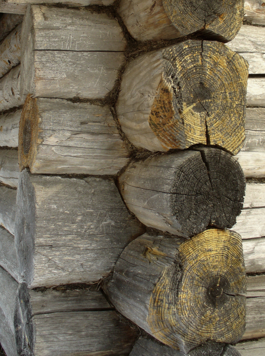 Угол сруба, выполненный рубкой "в обло"